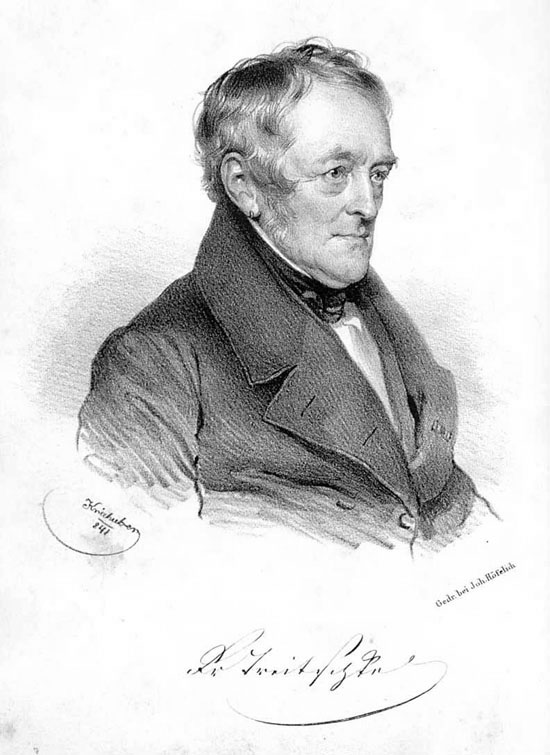 Georg Friedrich Treitschke, german lepidopterologist, librettist and translator